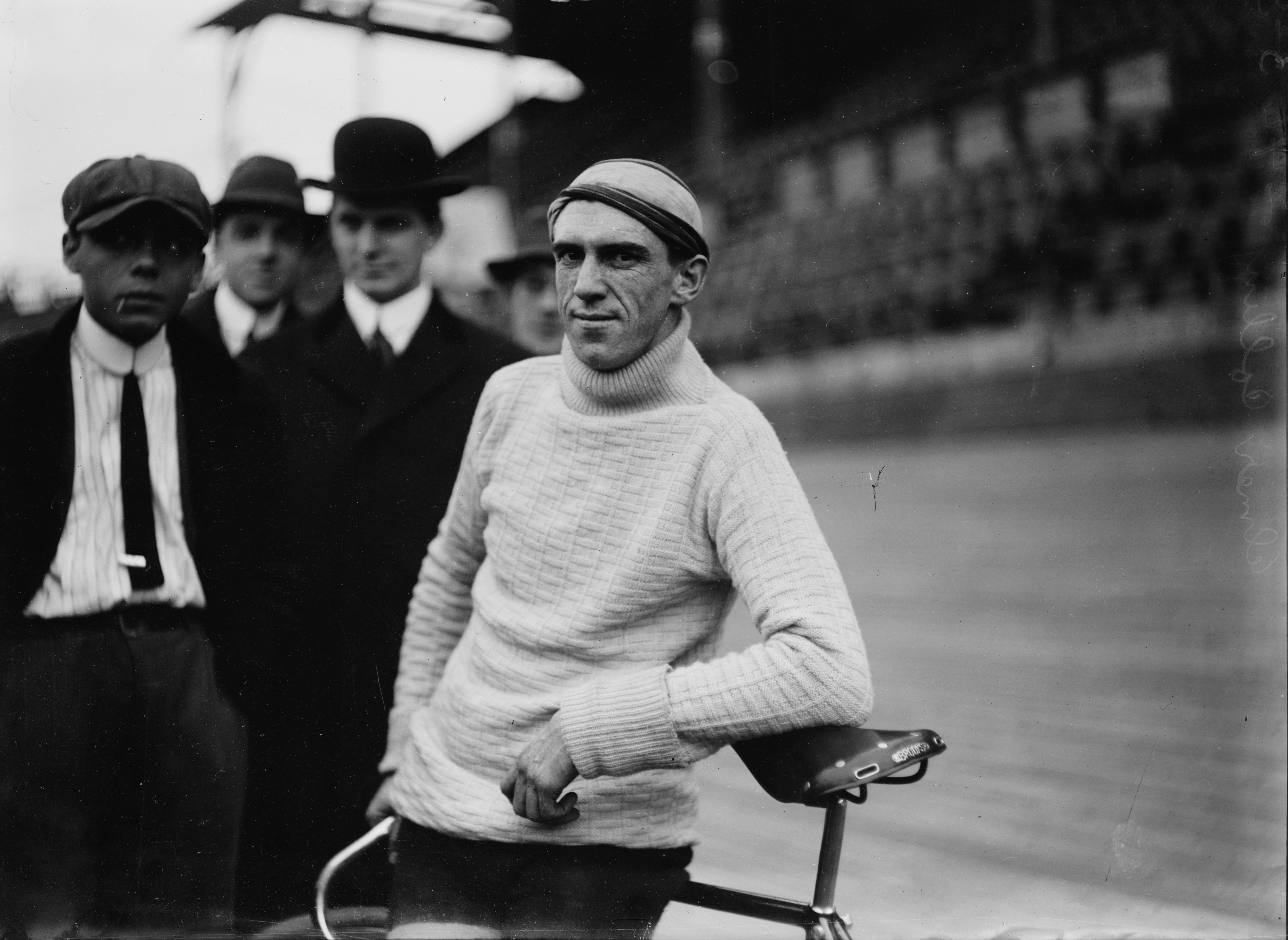 Elmer Collins, 12/5/12